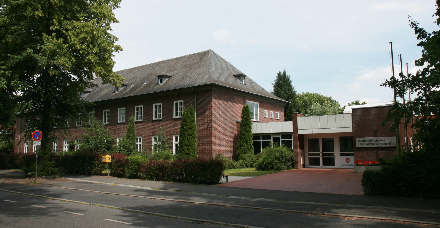 Gebäude des Niedersächsischen Oberverwaltungsgerichts, Uelzener Straße 40 in Lüneburg (erbaut als Offizier-Kasino).